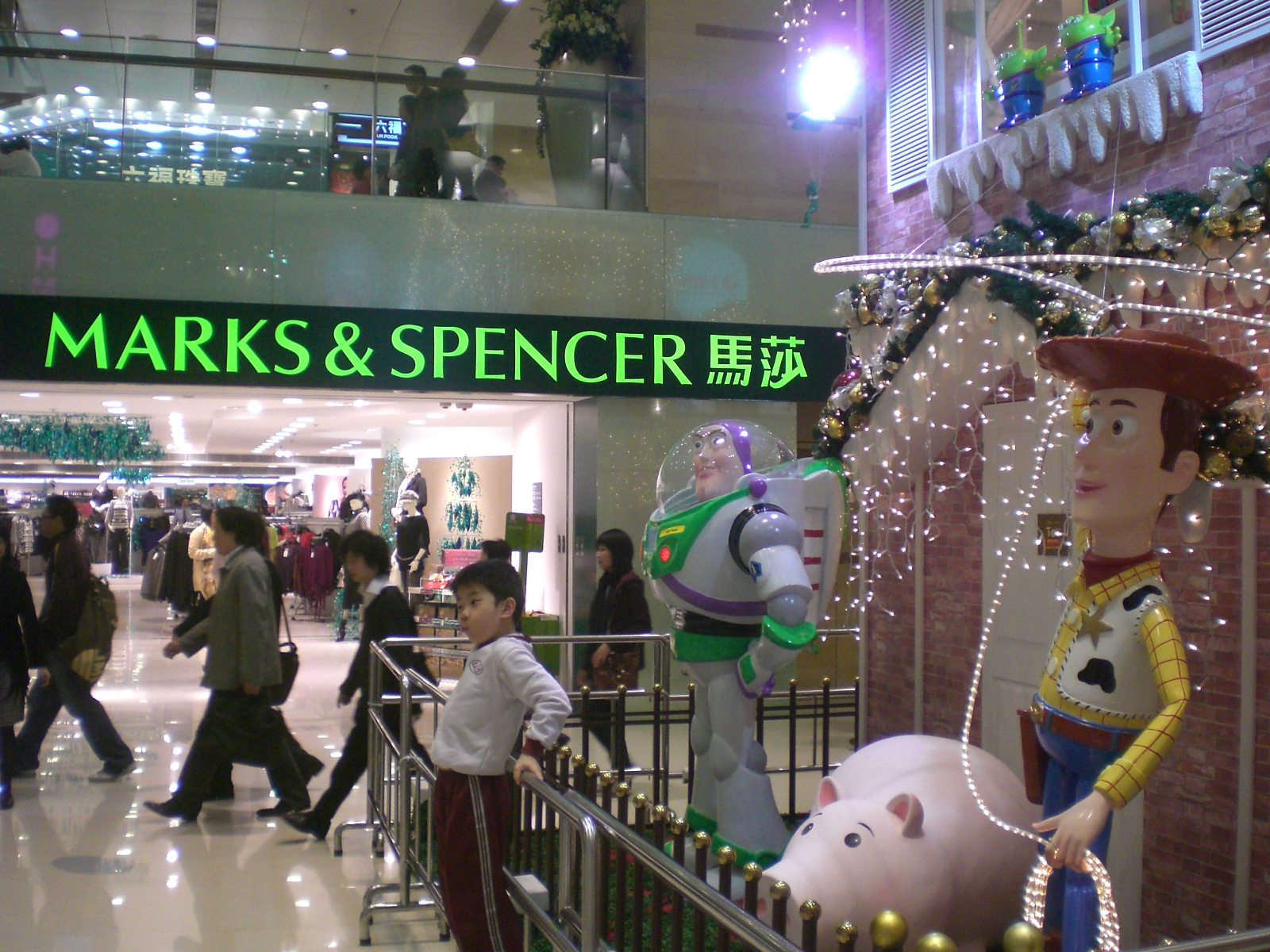 2007年香港聖誕節在德福廣場瑪莎百貨